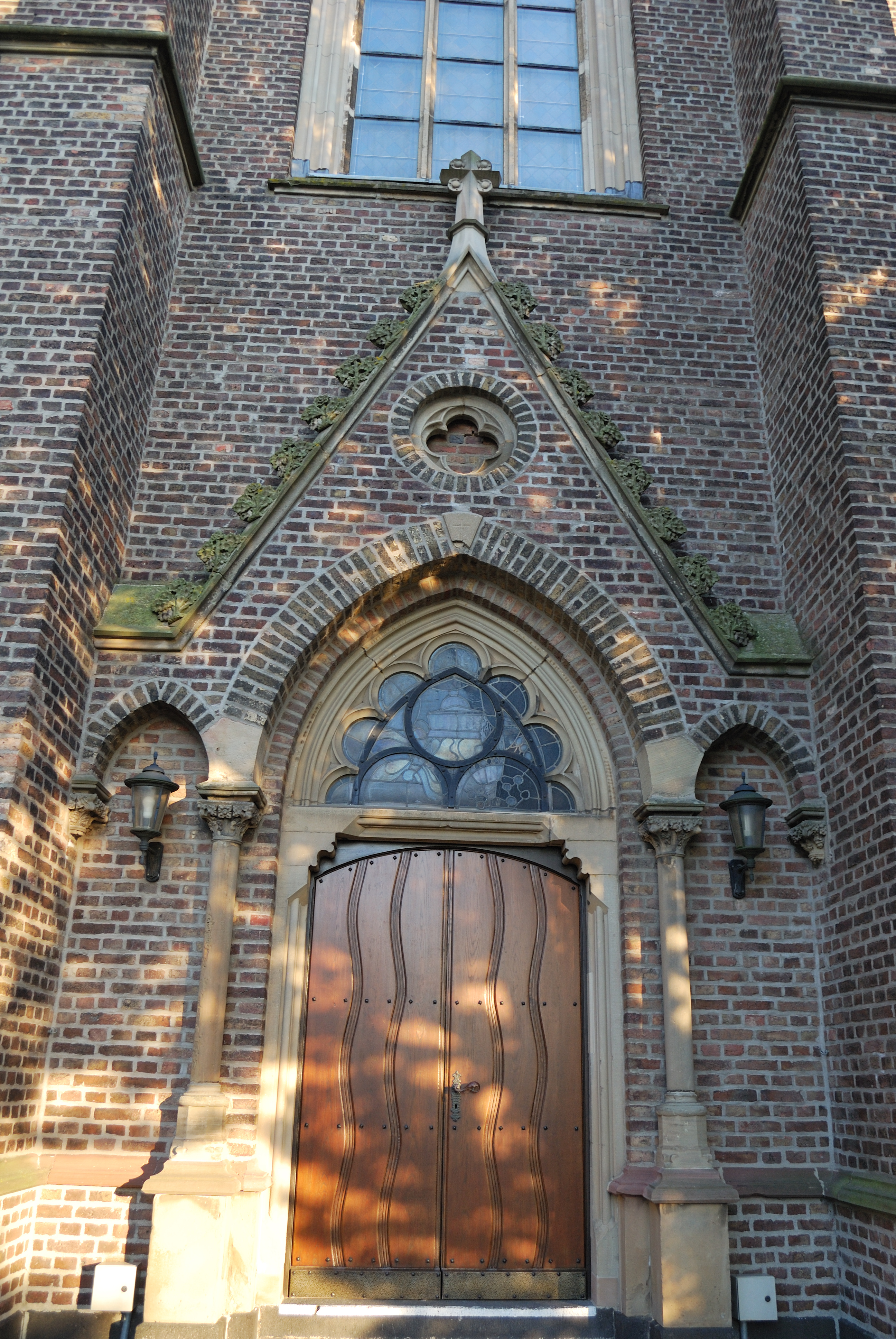 Denkmalnummer 150